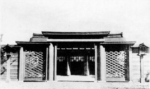 State foundation shrine of Manchukuo（满洲国建国神庙）